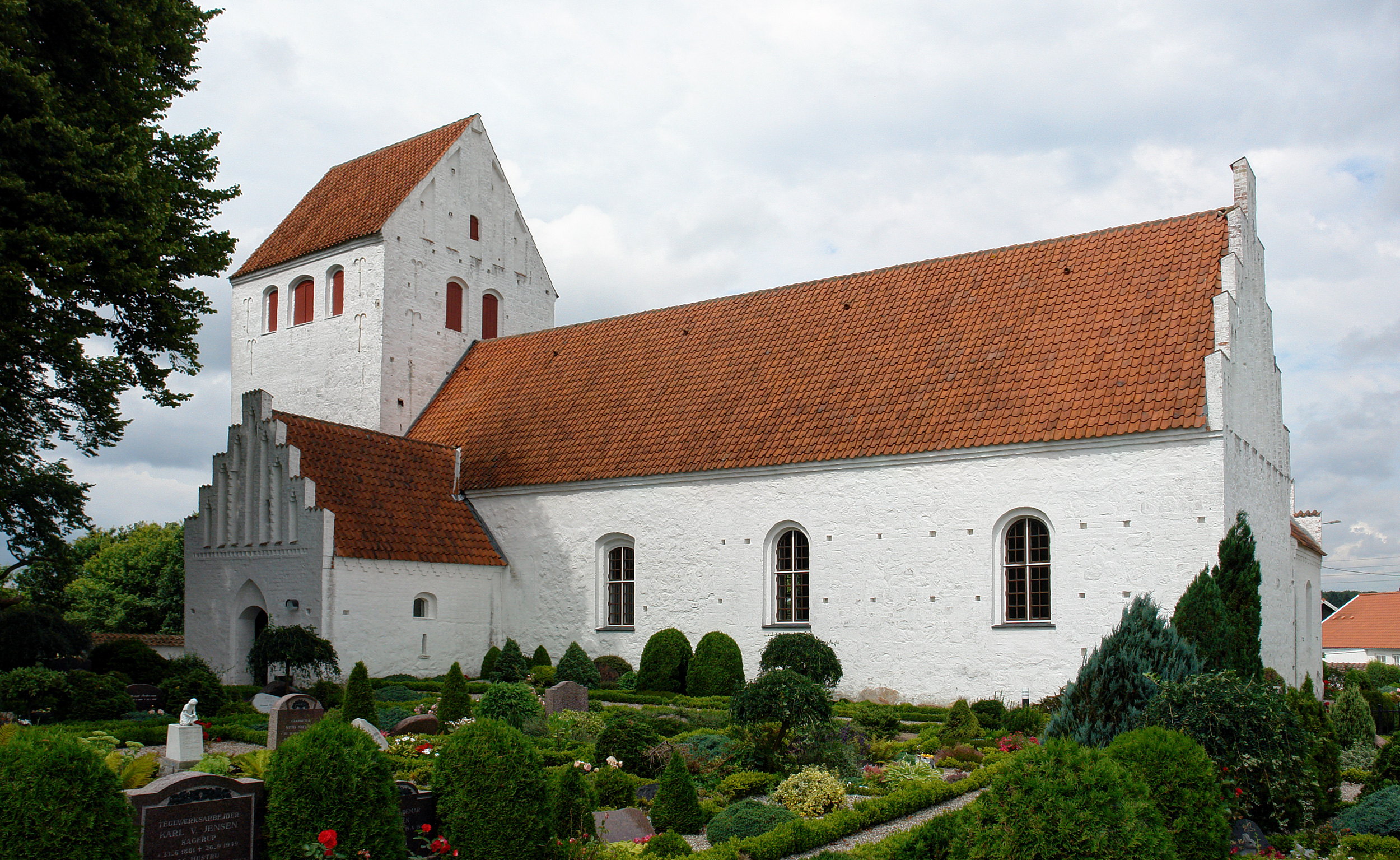 Kirche von Undløse, Dänemark (West-Seeland).